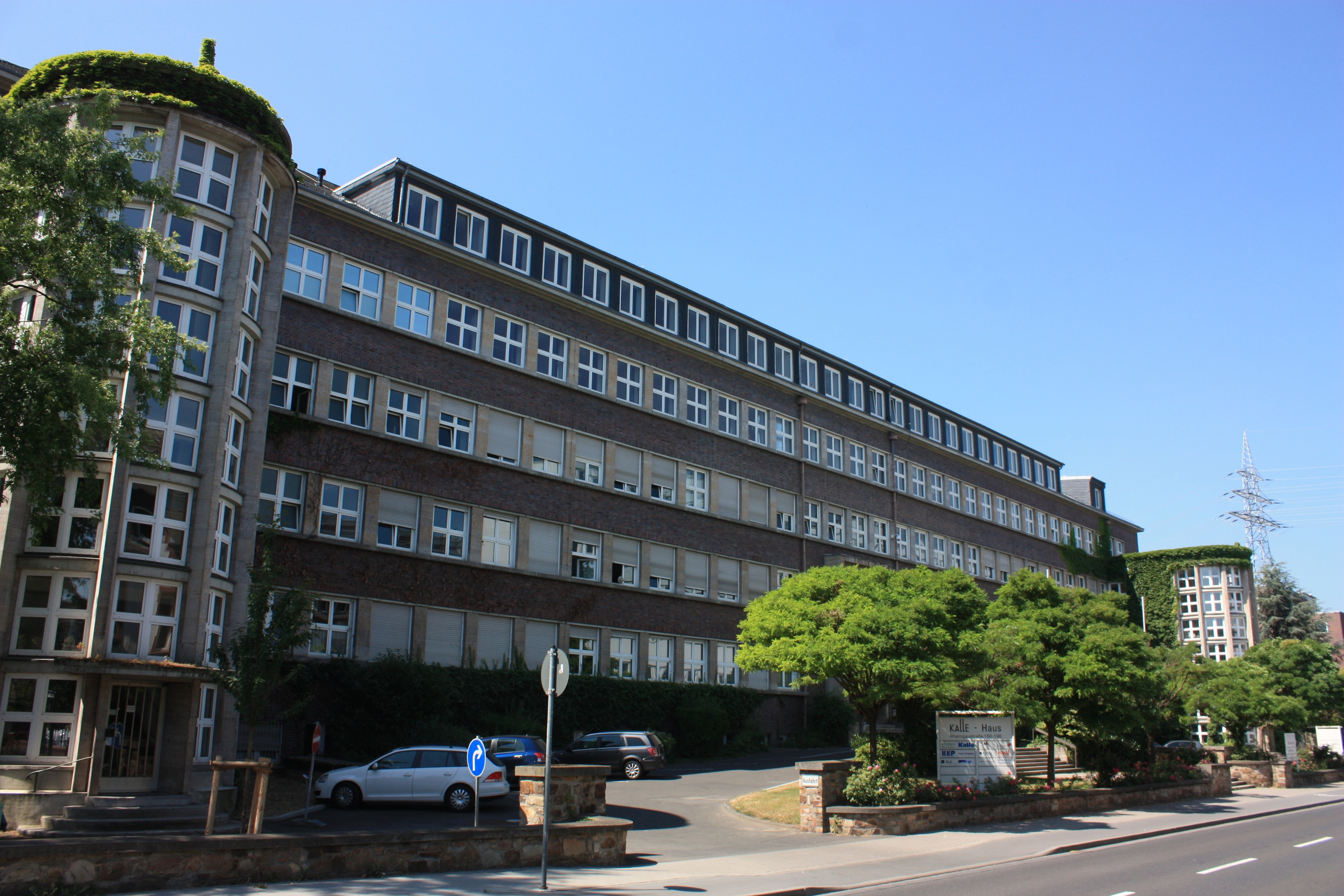 Das 1938 erbaute Verwaltungsgebäude der Kalle-Werke in Wiesbaden. Das Haus ist Bestandteil der Route der Industriekultur Rhein Main